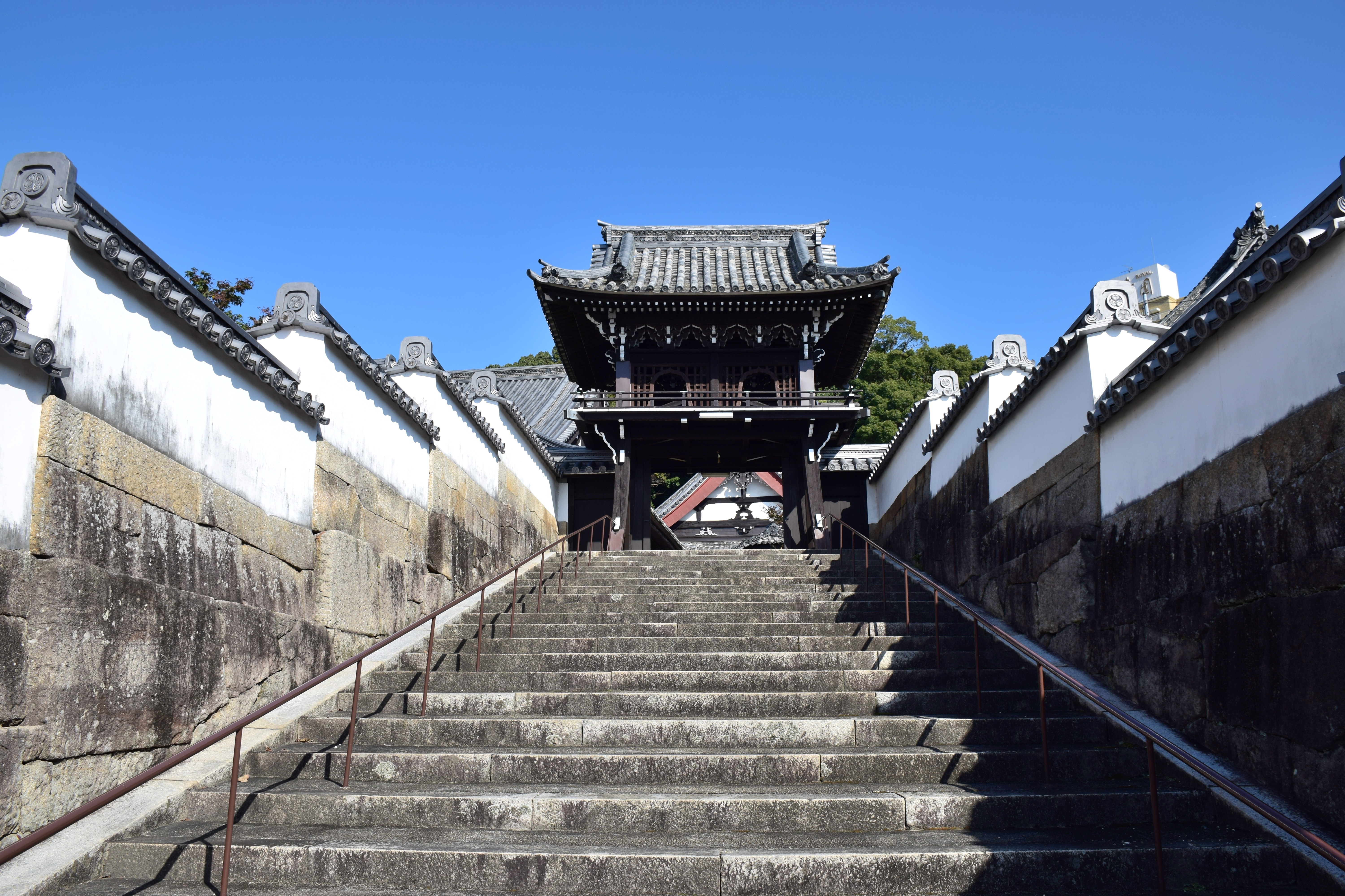 随念寺山門